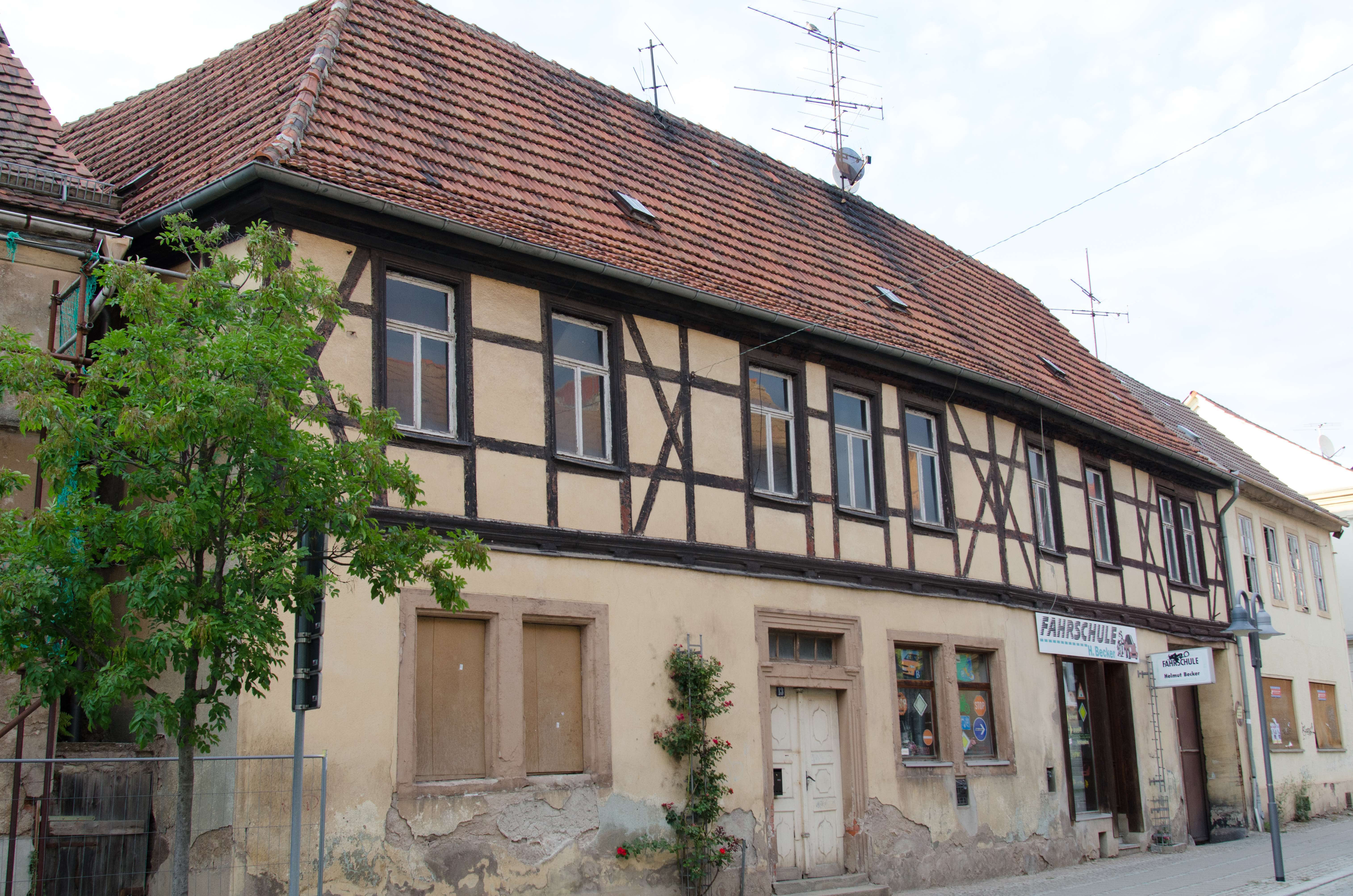 Sangerhausen, Riestedter Straße 13